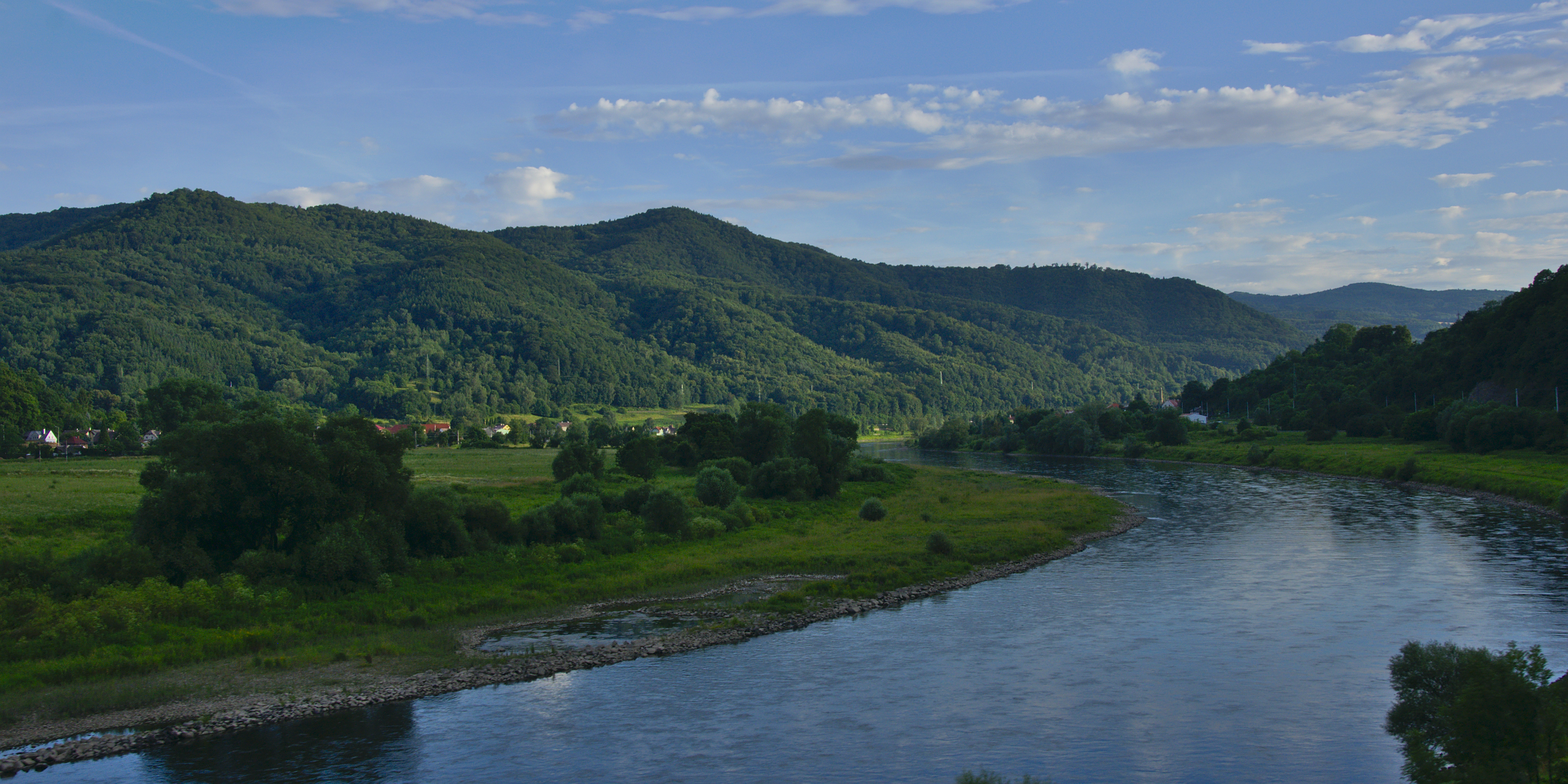 Malé Březno, nad ním kopce Lichá a Magnetovec, okres Ústí nad Labem